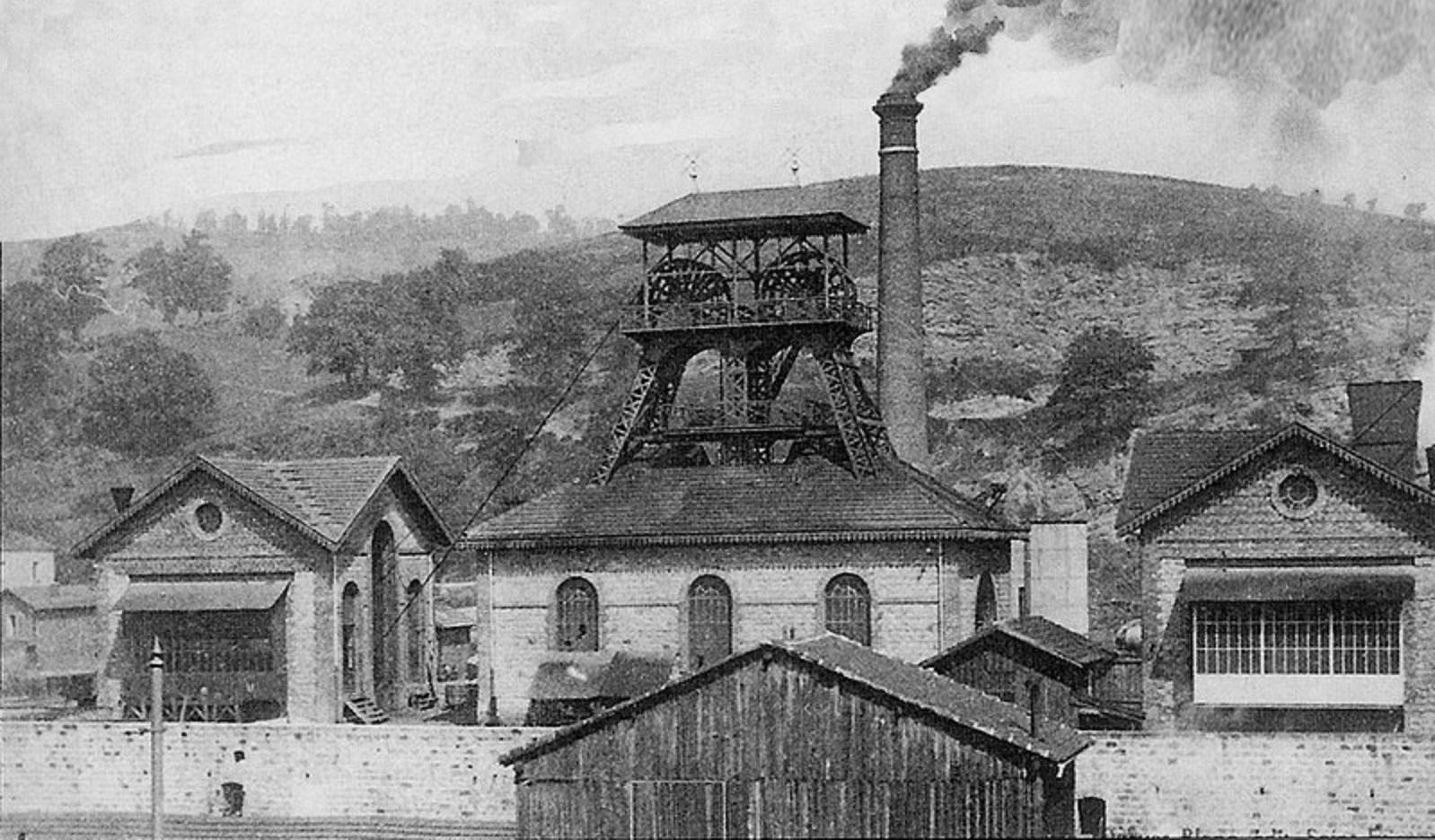 Le puits des Combes en activité.